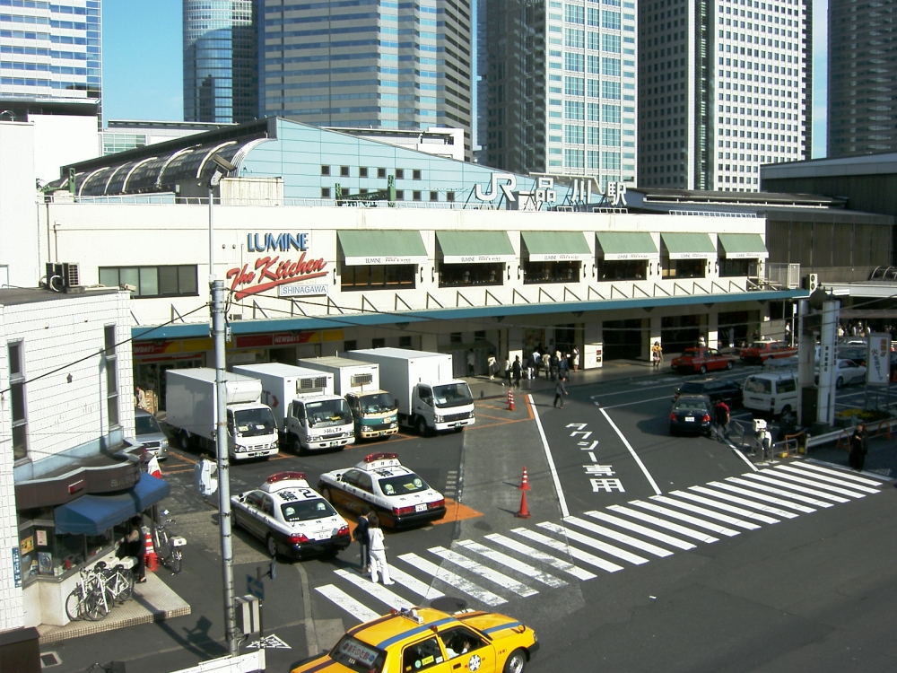 Shinagawa_Station 2007